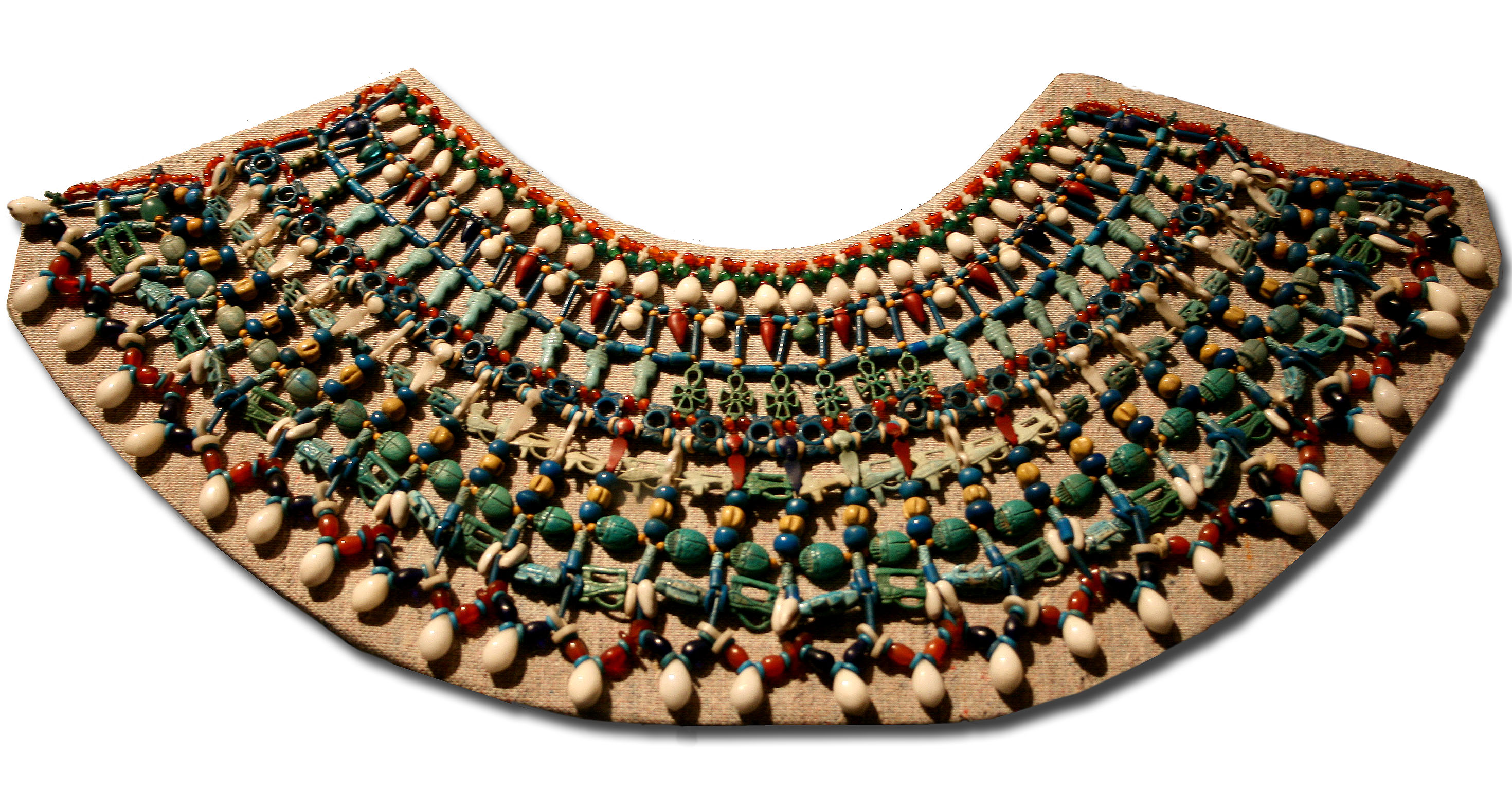 Halskette der Amanishakheto aus Meroe (heute: Ägyptisches Museum Berlin, Inv. Nr. 22877)